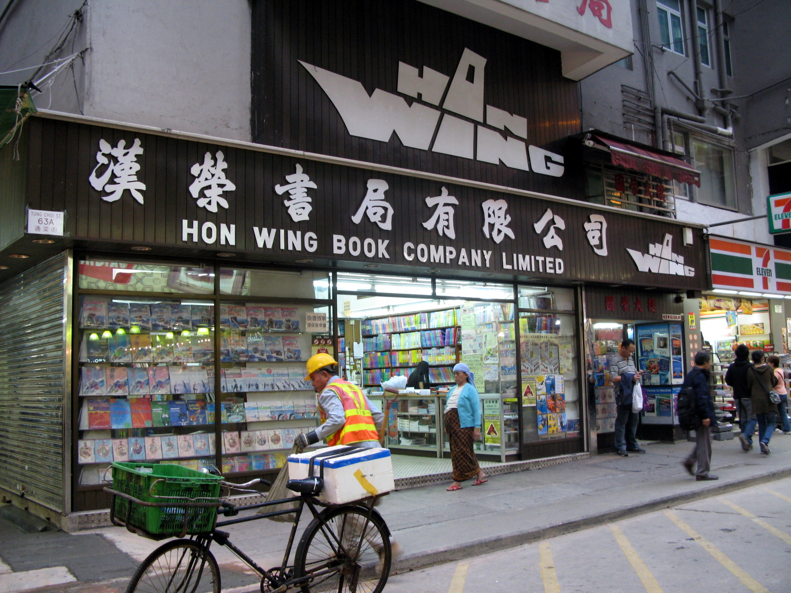 Hon Wing Book Company in Mong Kok